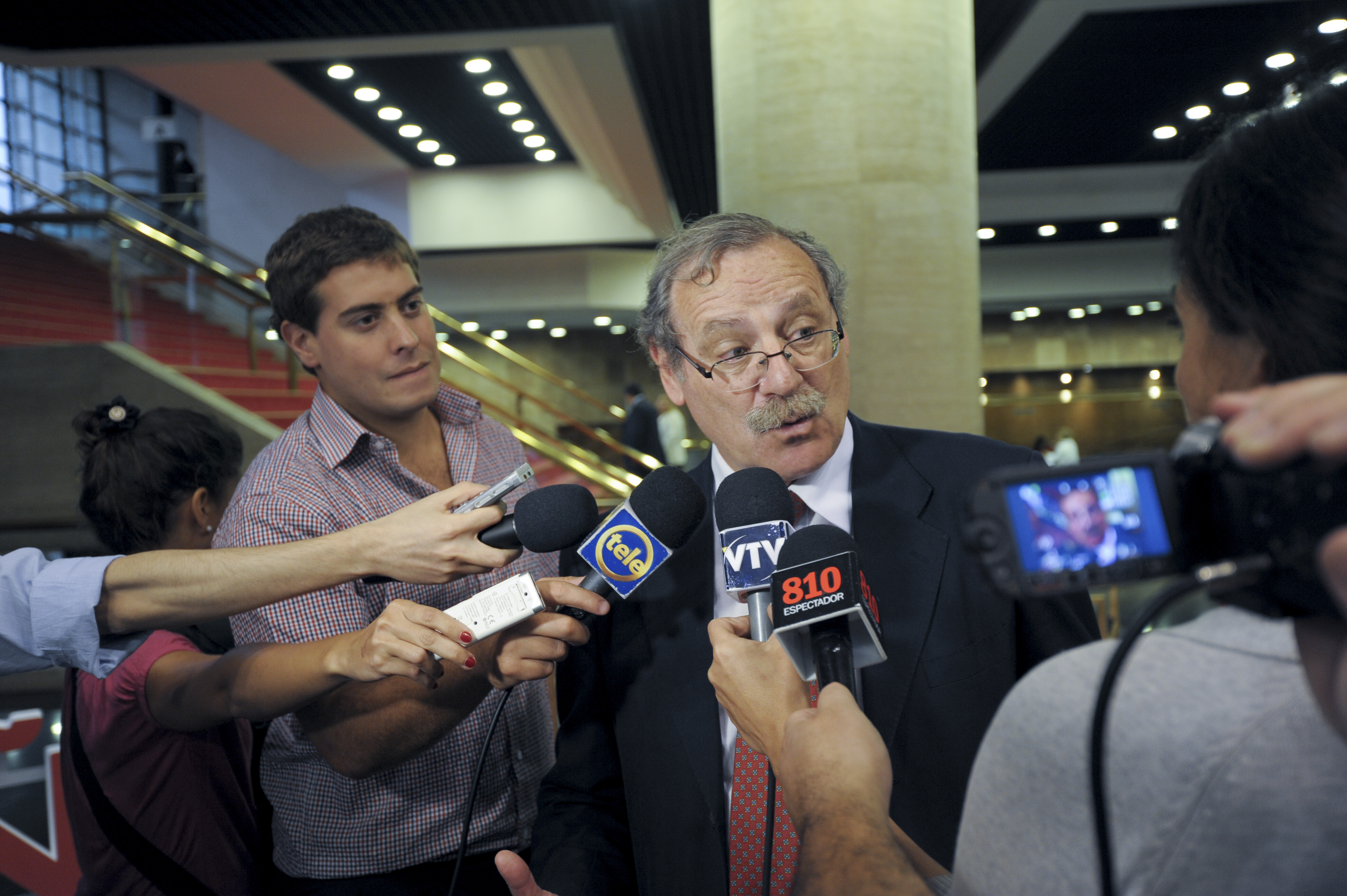 El 3 de abril del año 2011 se realizó en Uruguay, la Ceremonia de Apertura de los Festejos del Año XIII. Dicho evento estuvo enmarcado en las actividades conmemorativas del Bicentenario de Uruguay, las cuales tuvieron lugar durante ese año. En a ceremonia, que tuvo lugar en Montevideo, participaron mas de 500 niños de 19 escuelas de todo el país. La fotografía fue tomada por Santiago Barreiro para la Secretaría del Bicentenario, dependiente de la Comisión del Bicentenario, la cual está conformada por autoridades de todos los partidos políticos, de diferentes Ministerios y organismos públicos de Uruguay. Mail: Web